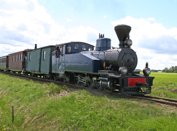 Minkiön kapearautatie Jokioisten kunnassa